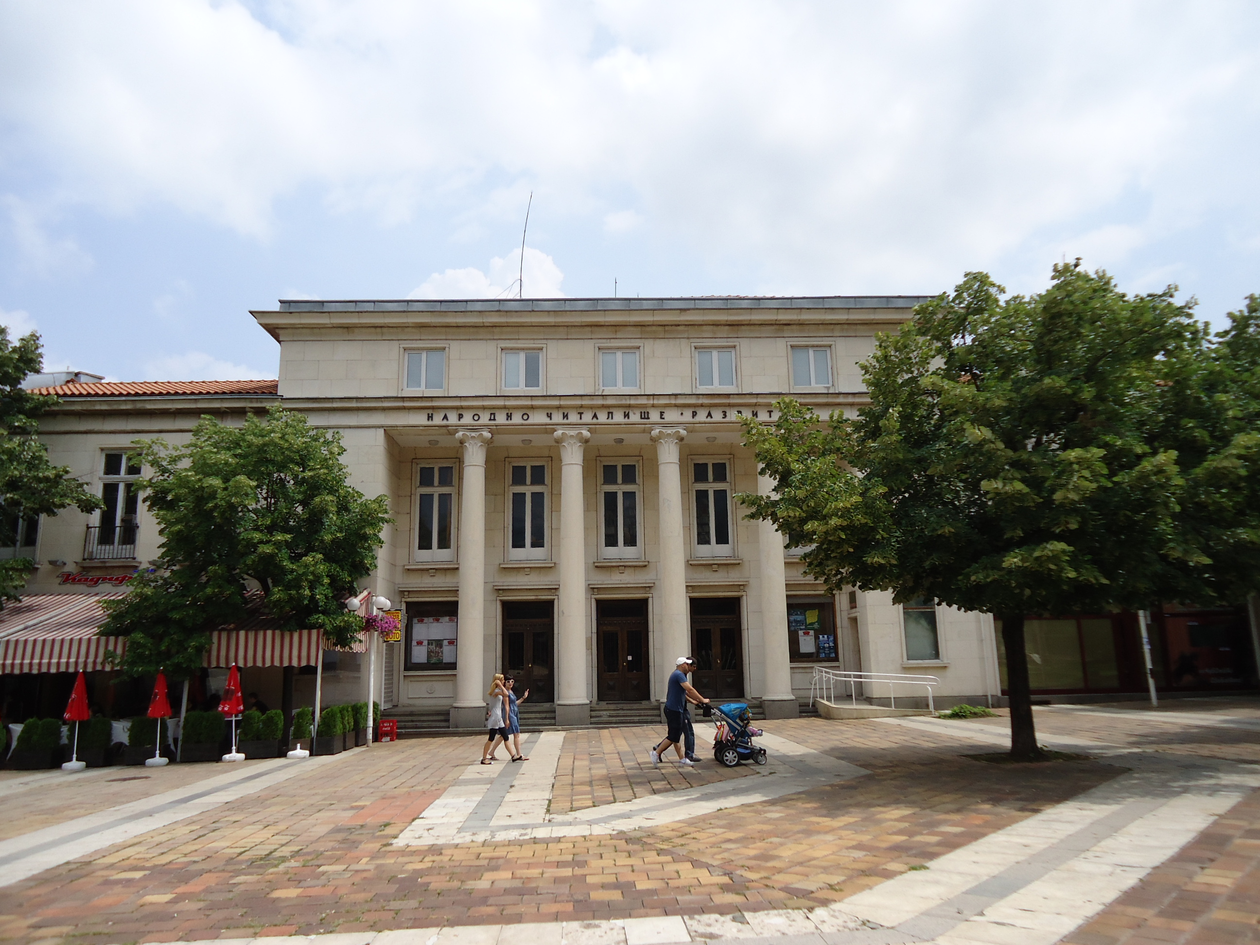 Читалище "Развитие", Враца